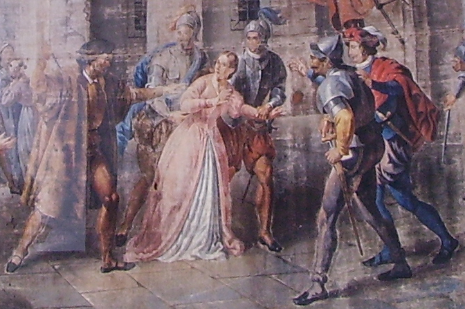 Sacrificio di Virginia, dipinto di Giuseppe Ruffini (1811)